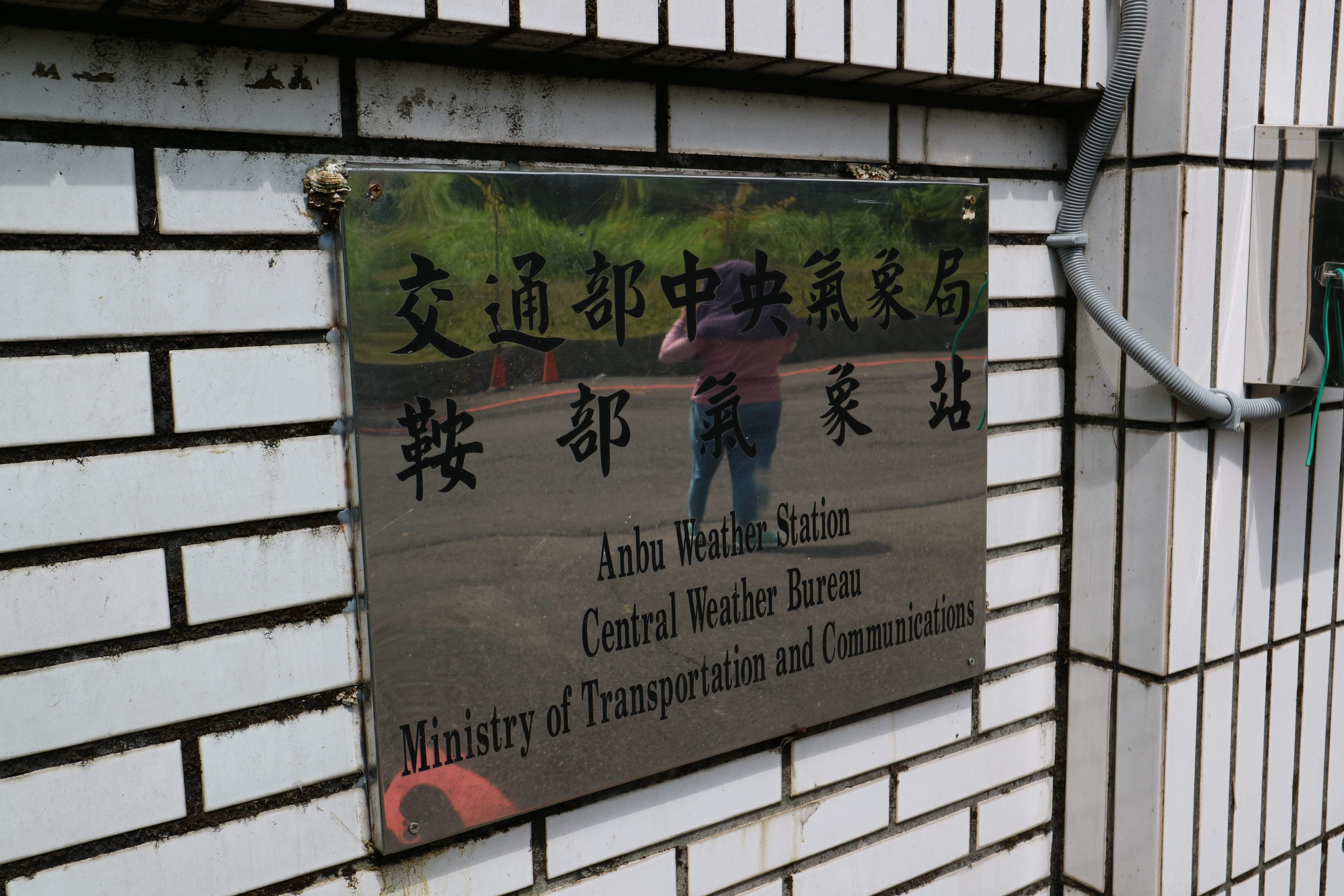 中文（台灣）: 交通部中央氣象局鞍部氣象站門牌